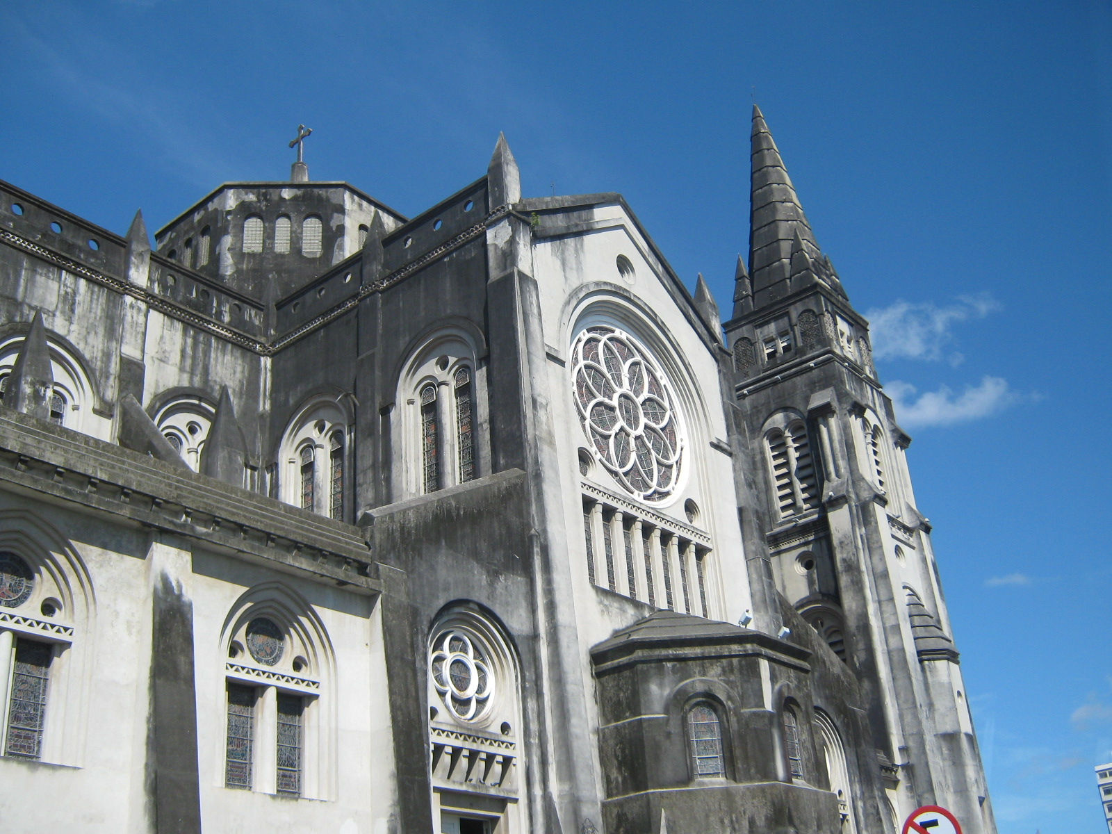 Fortaleza city, Ceará, Brazil